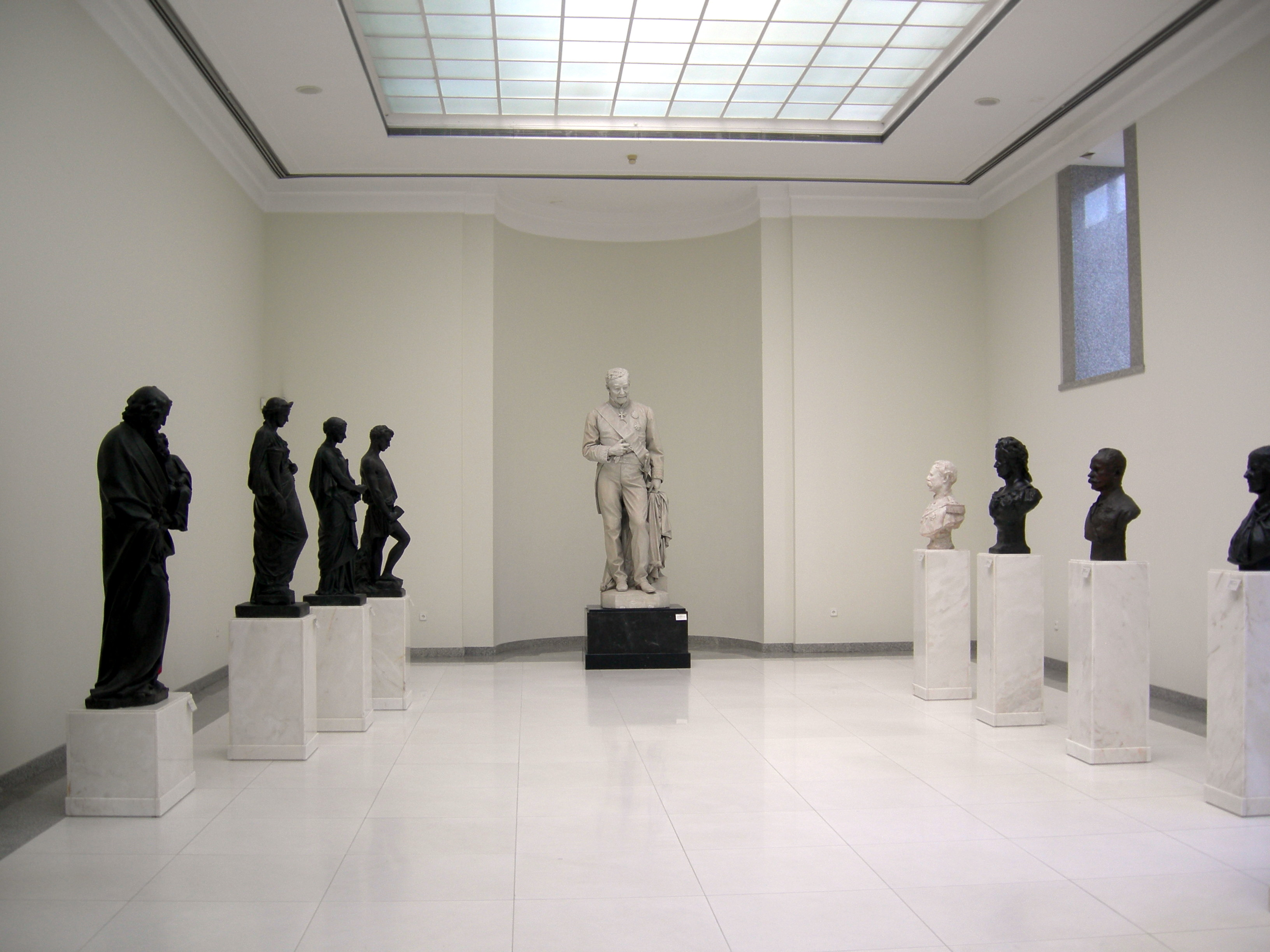 Porto, Museum